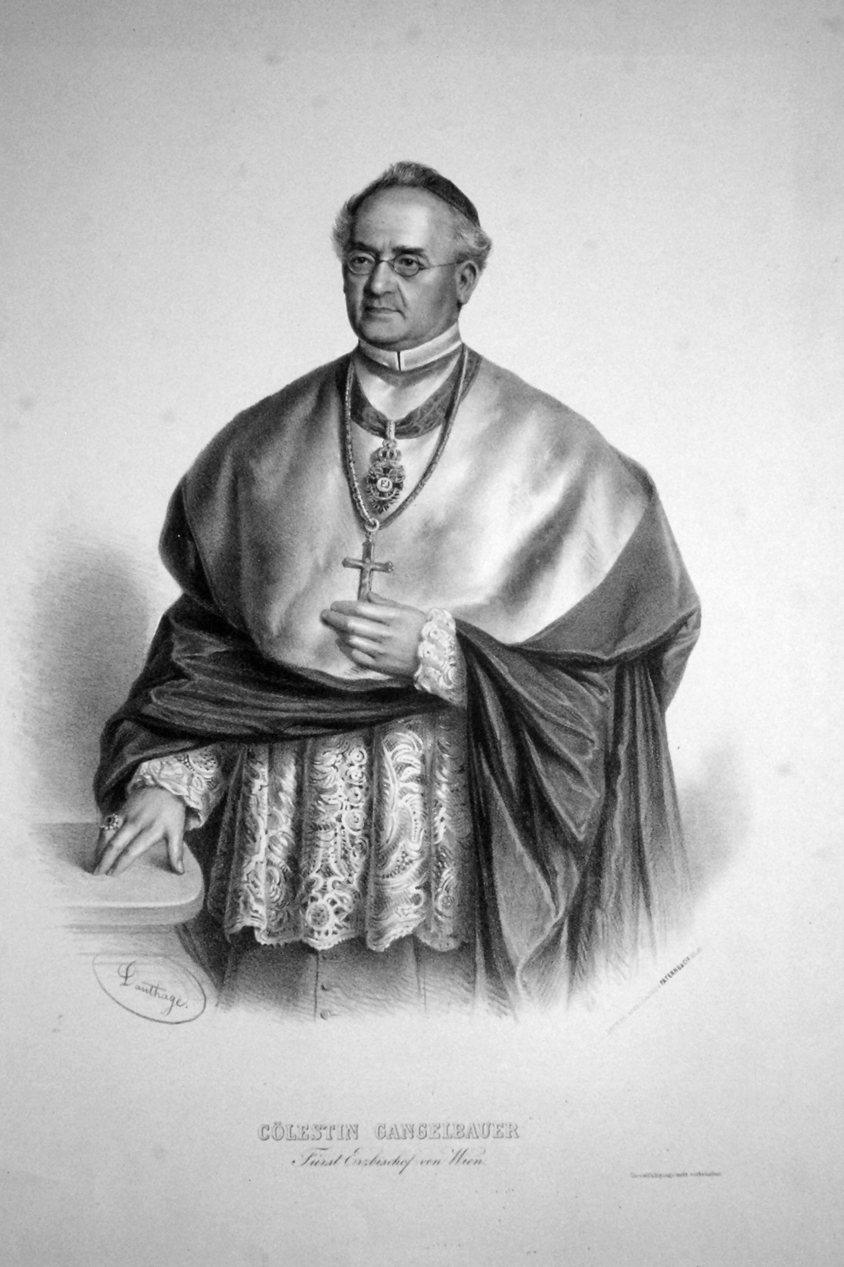 Cölestin Joseph Ganglbauer, Lithographie von Adolf Dauthage